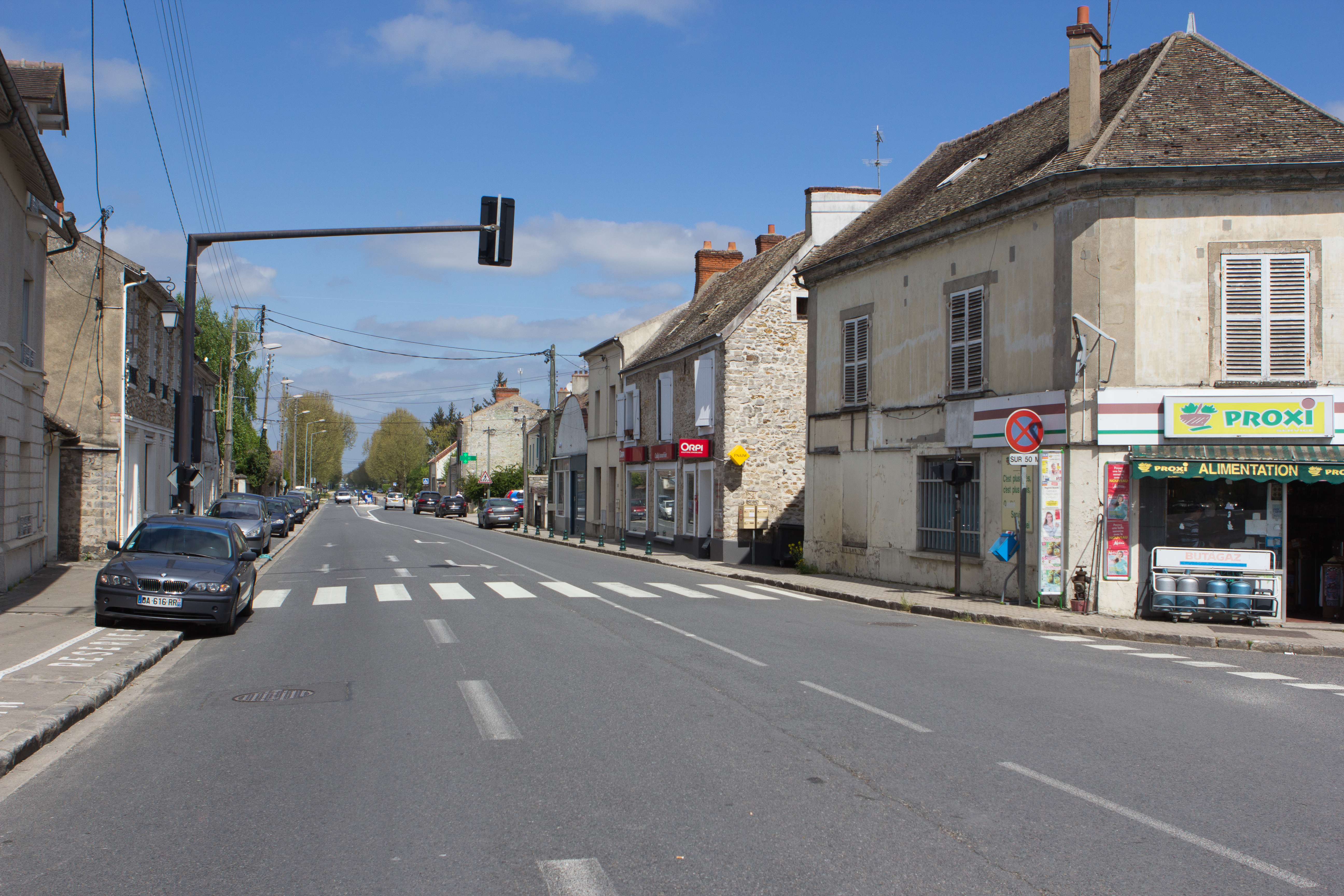 Rues de Chailly-en-Bière (Commune de Chailly-en-Bière, Seine-et-Marne, France)